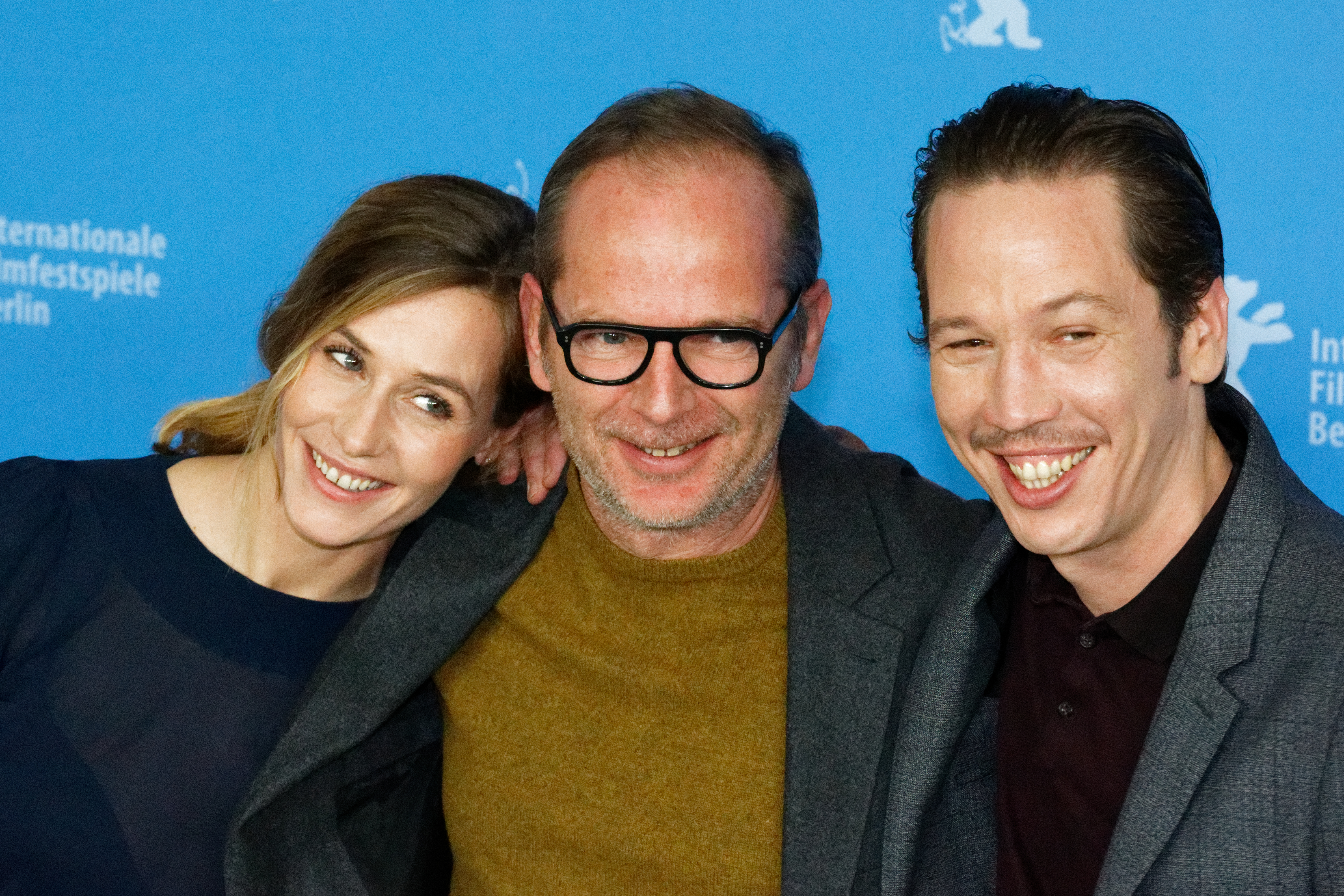 Cécile de France, Étienne Comar und Reda Kateb beim Photo Call zu Django bei der Berlinale 2017